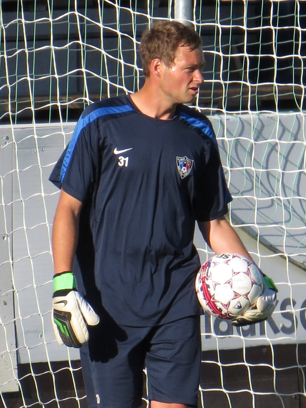 Eemeli Reponen, suomalainen jalkapallomaalivahti FC Inter Turun joukkueessa kaudella 2015.